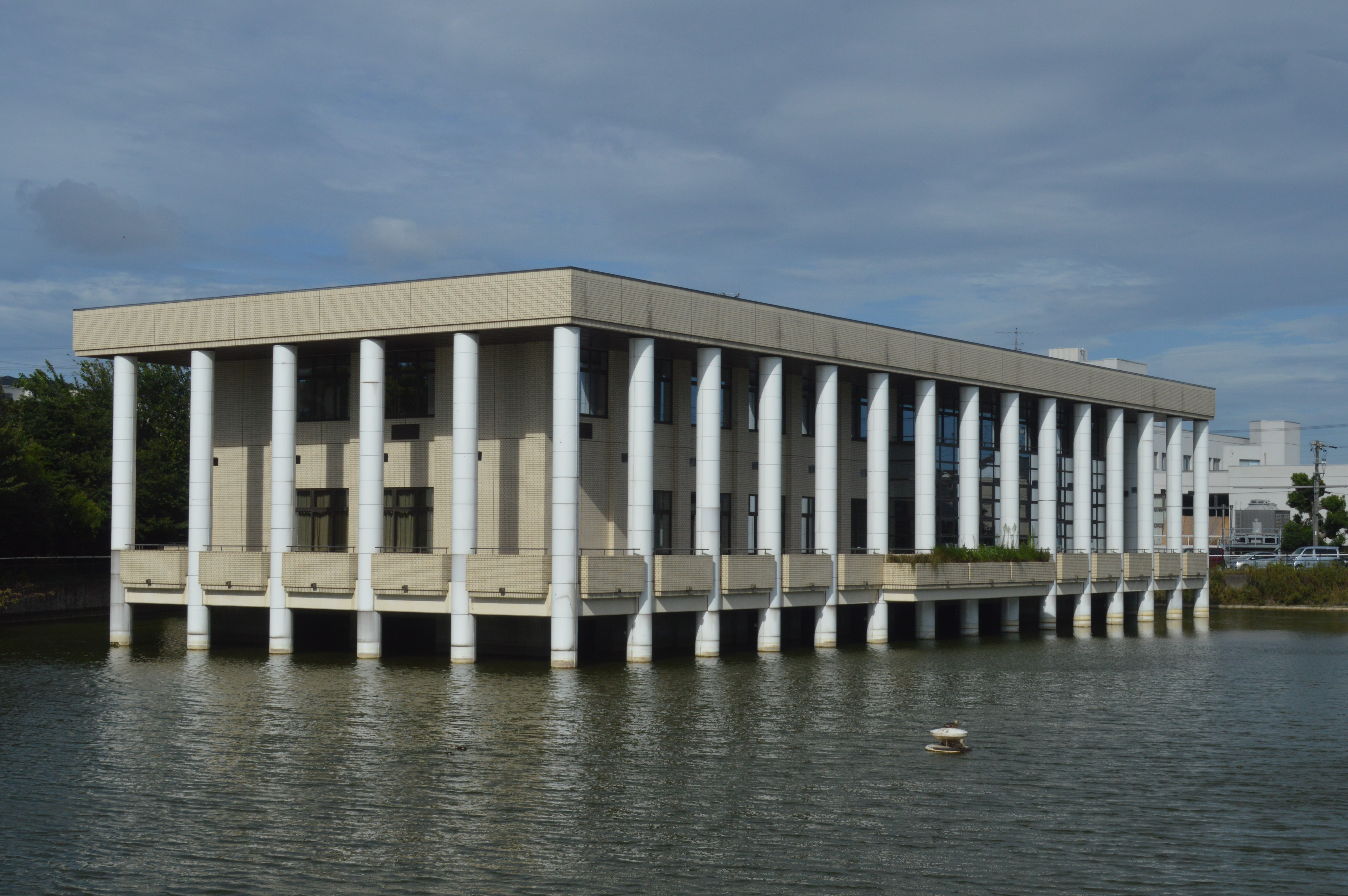 愛知県知多郡武豊町にある武豊町立図書館。